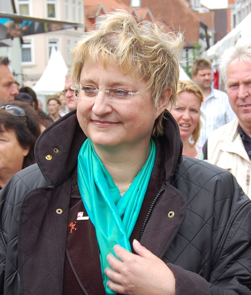 Oberbürgermeisterin Susanne Lippmann beim "Tag der Niedersachsen" in Hameln im Juni 2009